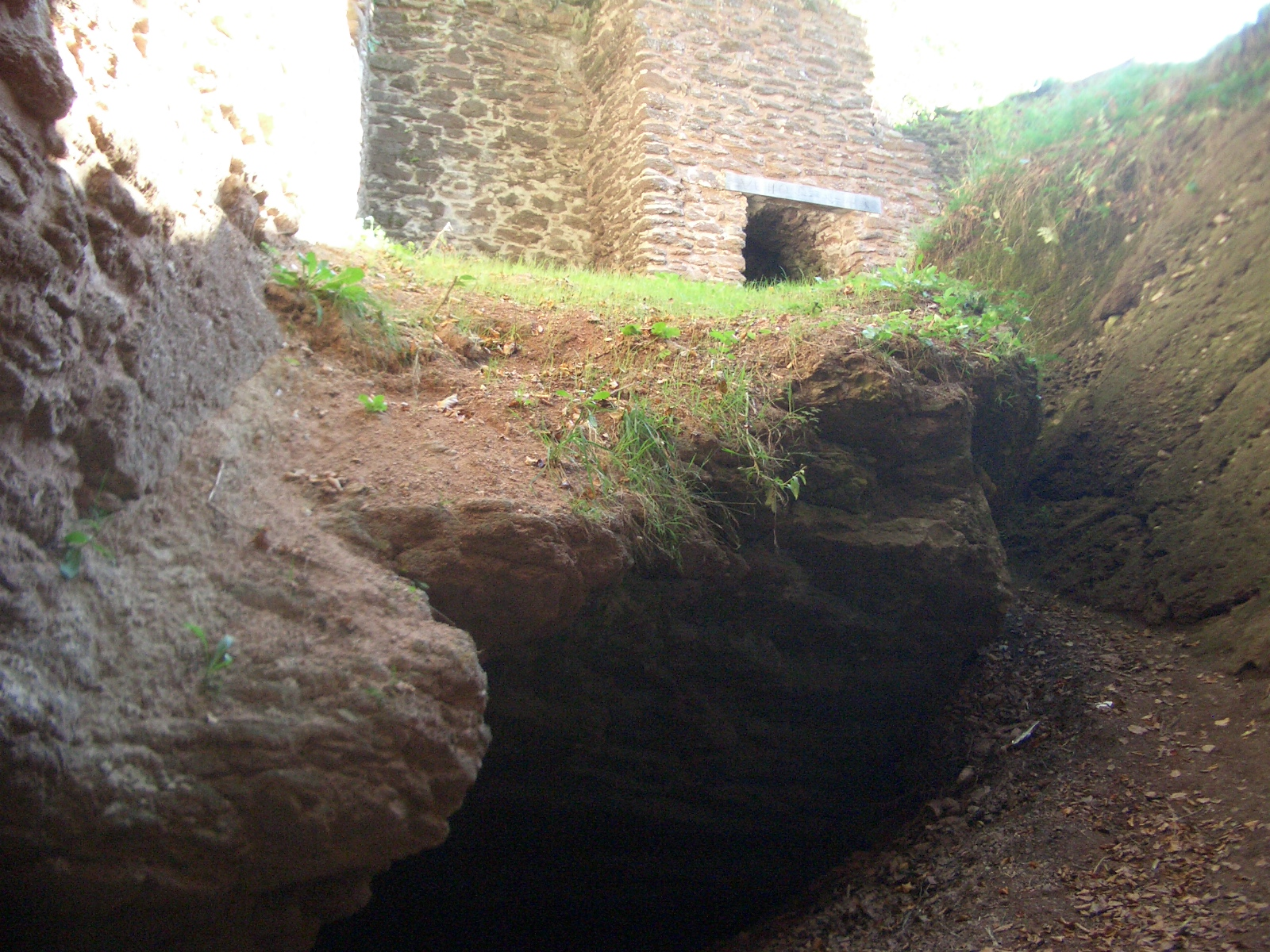 Břeštejn zevnitř